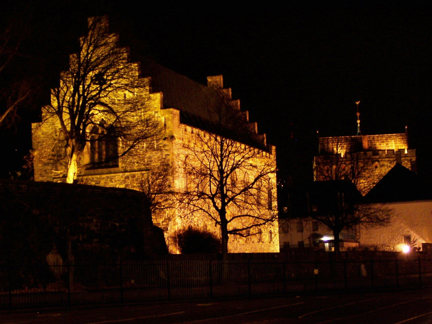 Håkonhallen og Rosenkranzttårnet in Bergen in Norway.